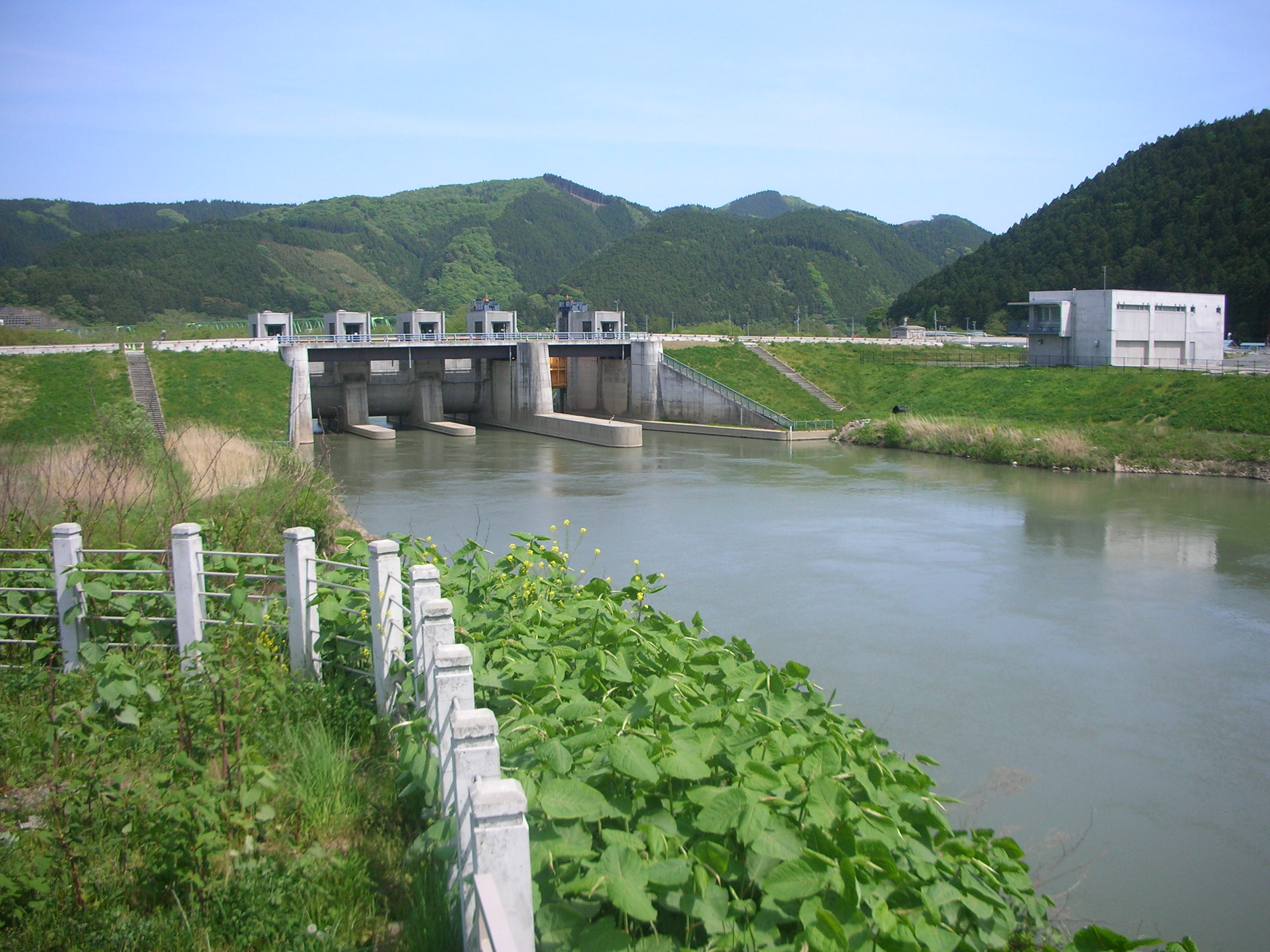 北上川～旧北上川 脇谷水門